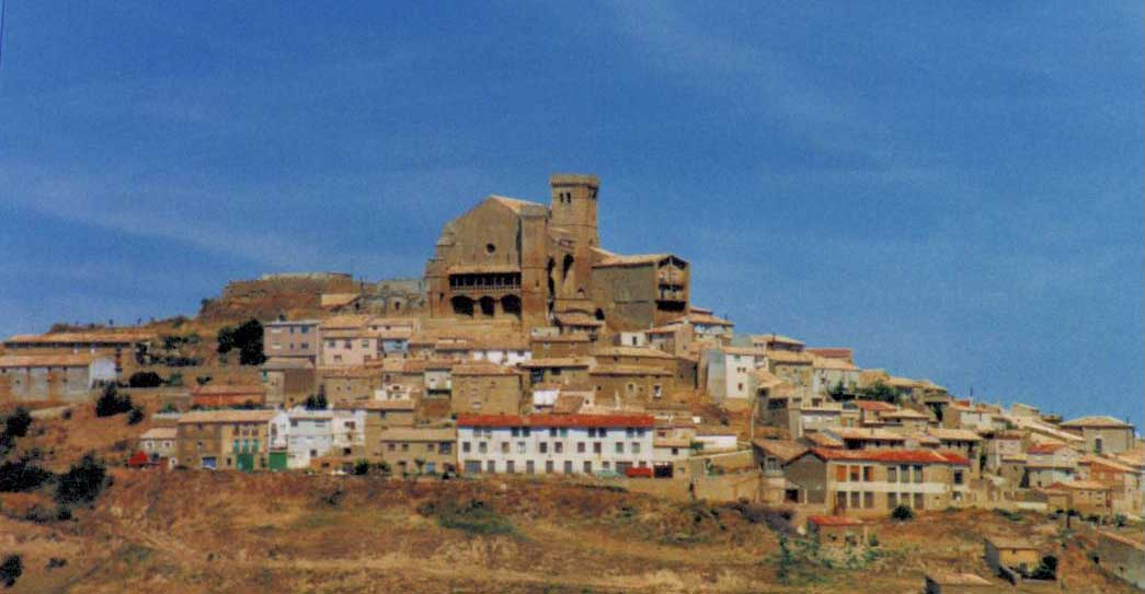 Ujué vista panorámica Foto realizada por mí; la cedo a Wikipedia